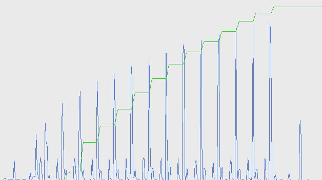 Drehmoment-/Drehwinkelkurve Impulsschrauber